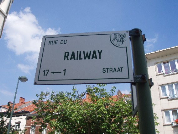 rue du Railway Auderghem Belgium plaque email